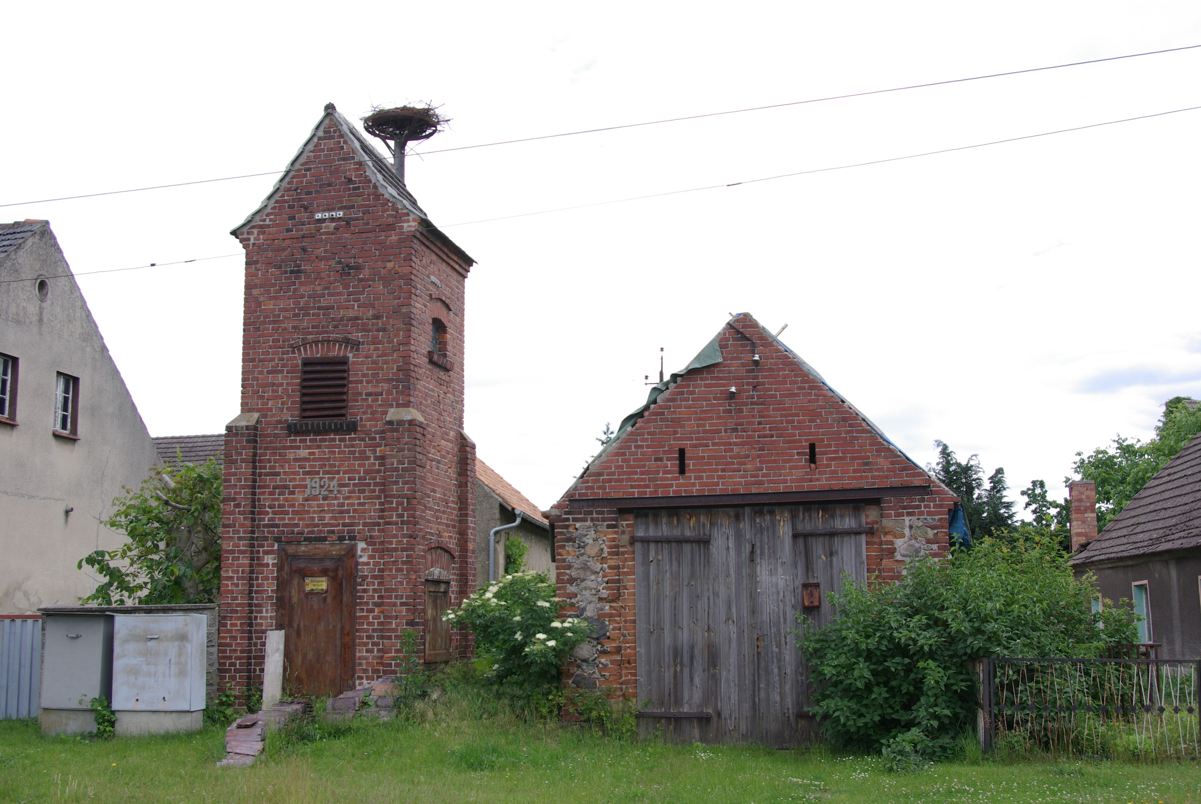 Friedland Niederlausitz in Brandenburg, Ortsteil Niewisch. Das Spritzenhaus und das Transformatorenhaus stammen aus dem Jahre 1924 und stehen unter Denkmalschutz.